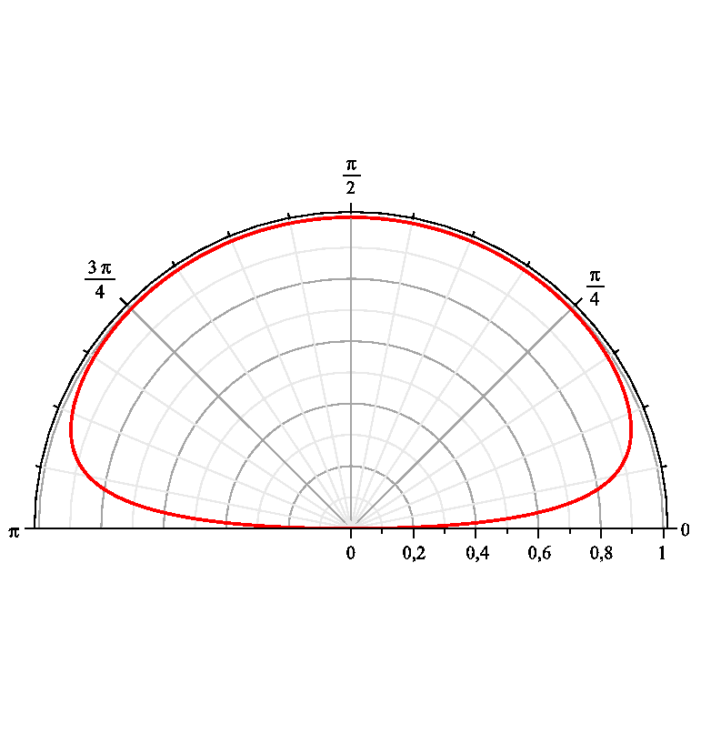 Emissivite quasi-isotrope